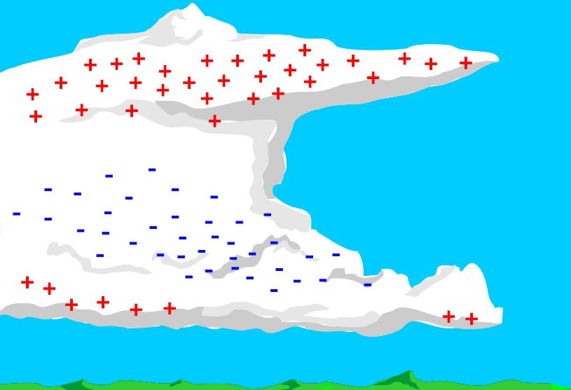 Esquema da distribuição das cargas em uma nuvem cumulonimbus.